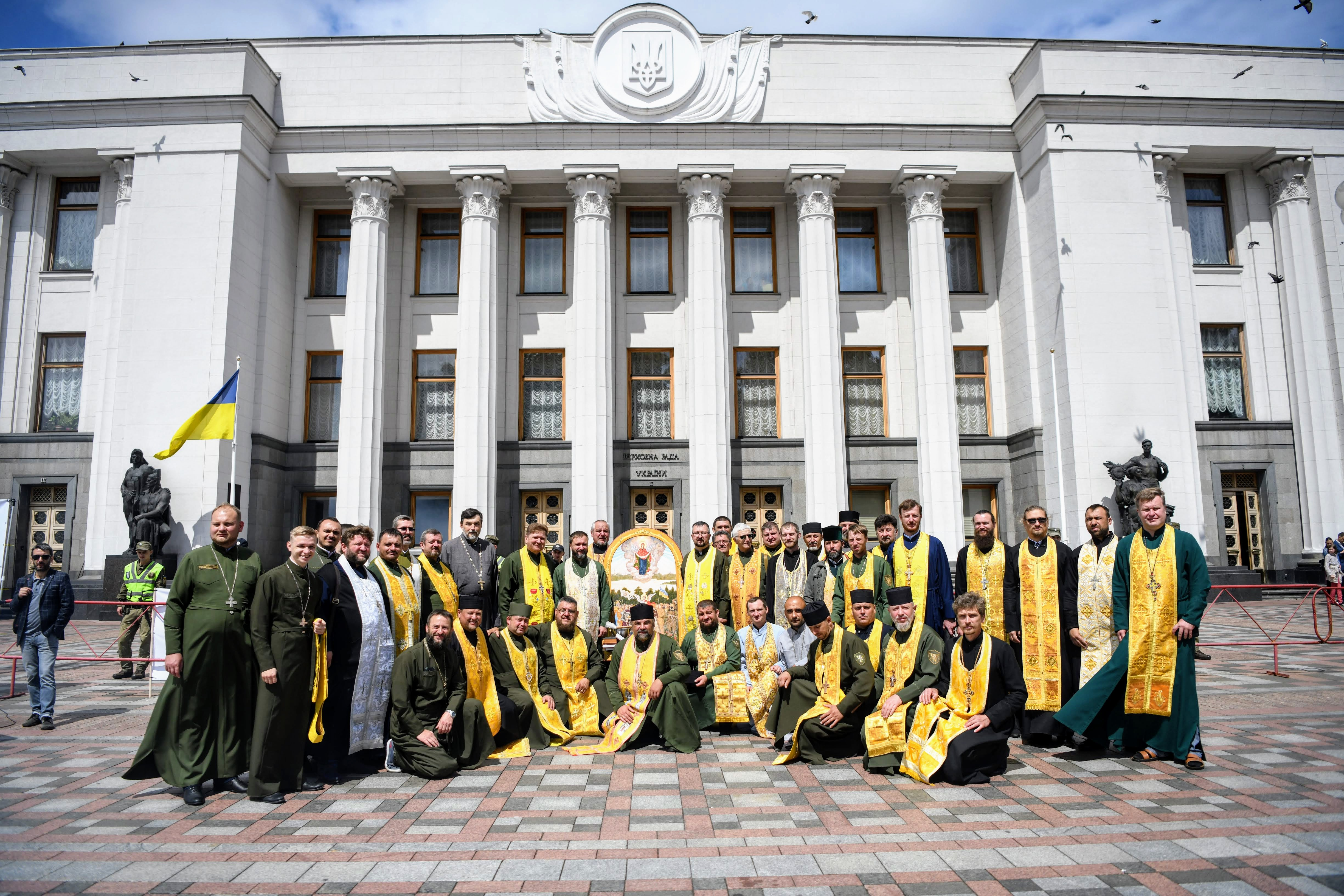 Капелани закликали нардепів легалізувати своє існування.